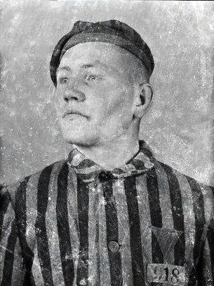 Kazimierz Piechowski, więzień nr 918 (1940-1942) niemieckiego obozu koncentracyjnego Auschwitz w Oświęcimiu (województwo małopolskie).